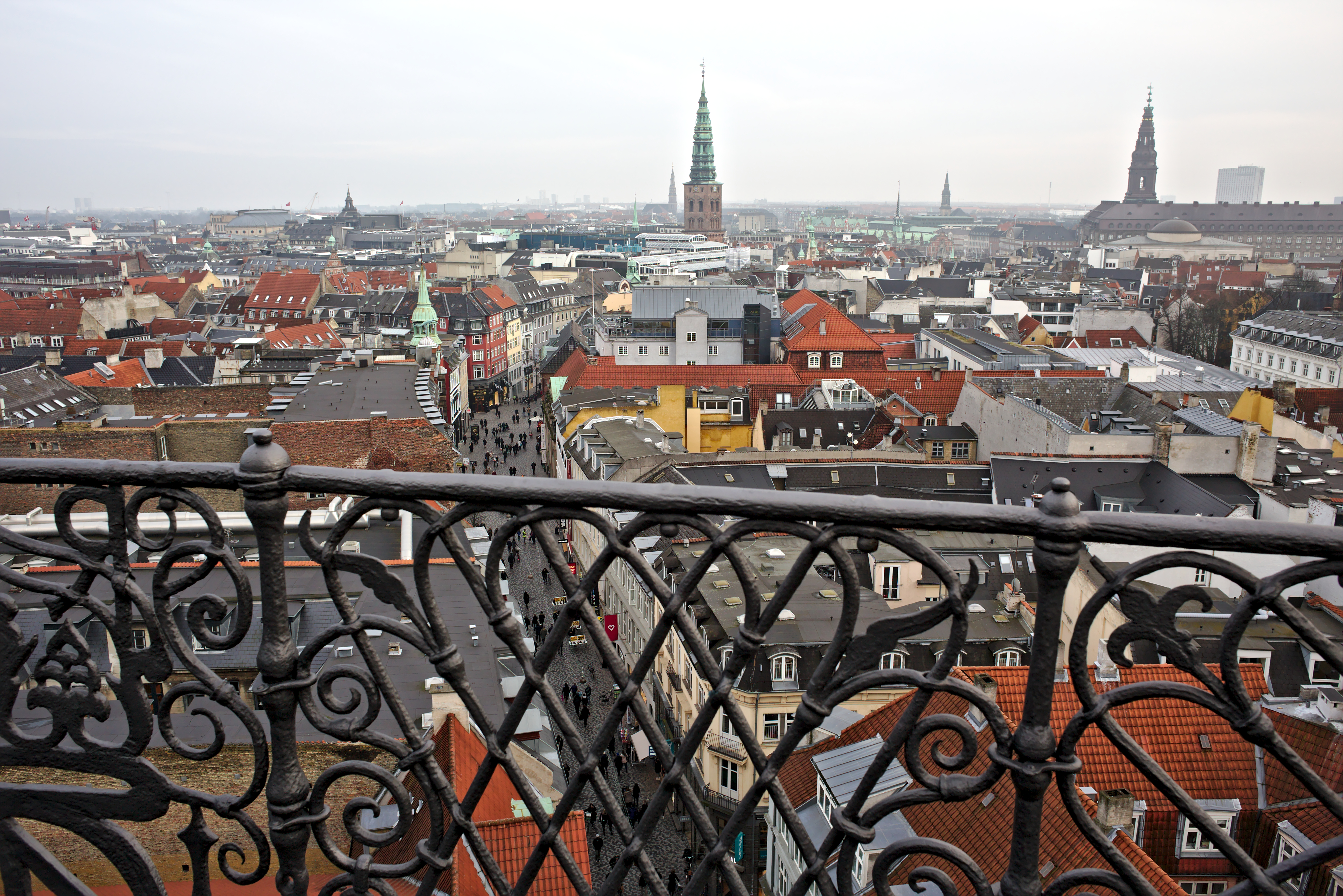 Rundetårn, Copenhagen